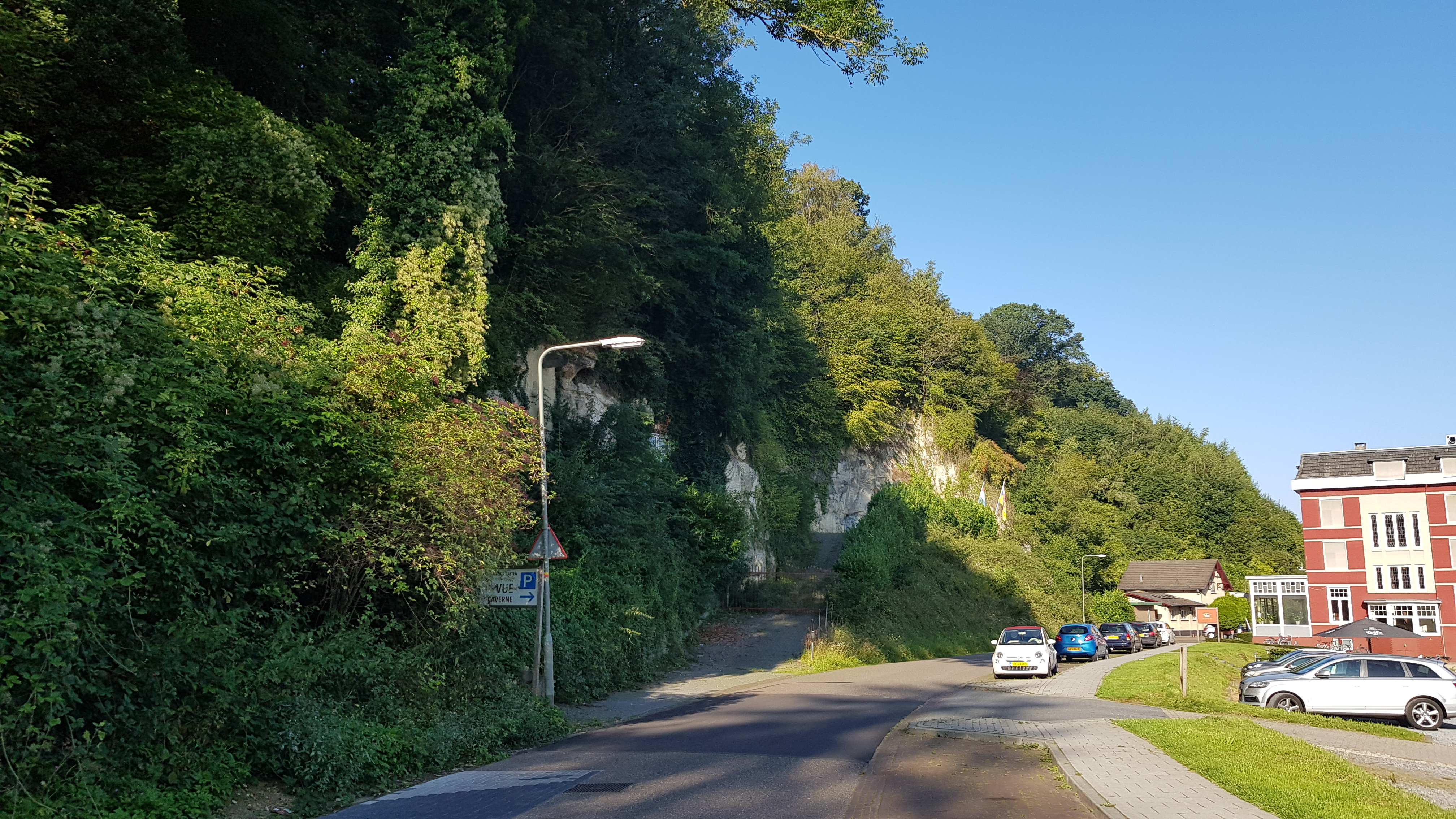 Koepelgroeve, Geulhem, Nederland